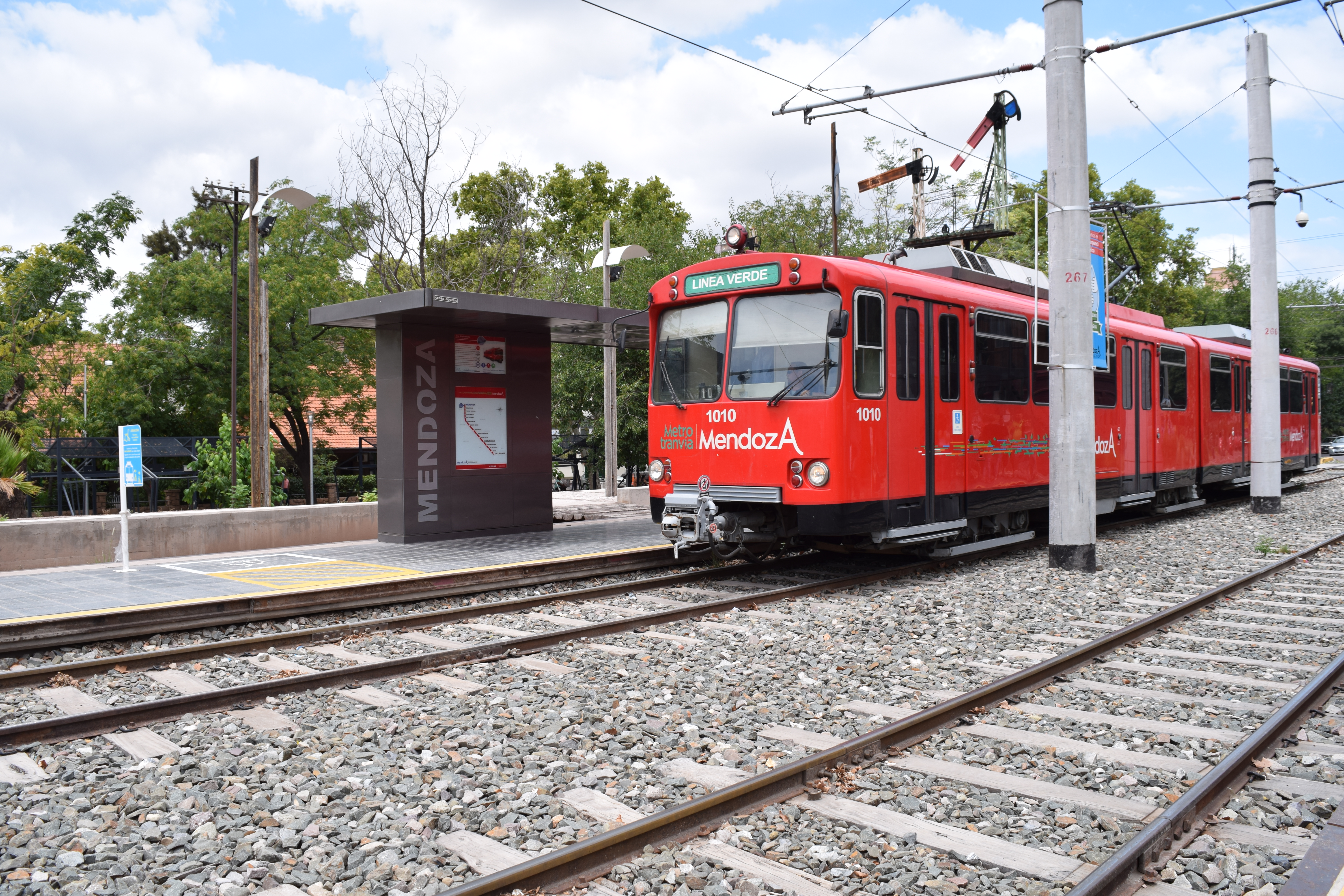 Siemens–Duewag U2 ingresando a la estación o parador Mendoza